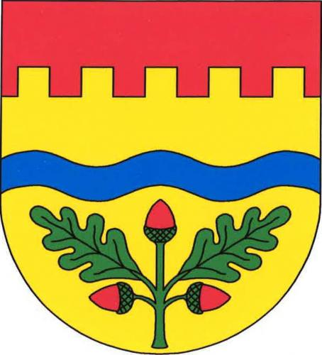 znak, Hradištko, okres Nymburk